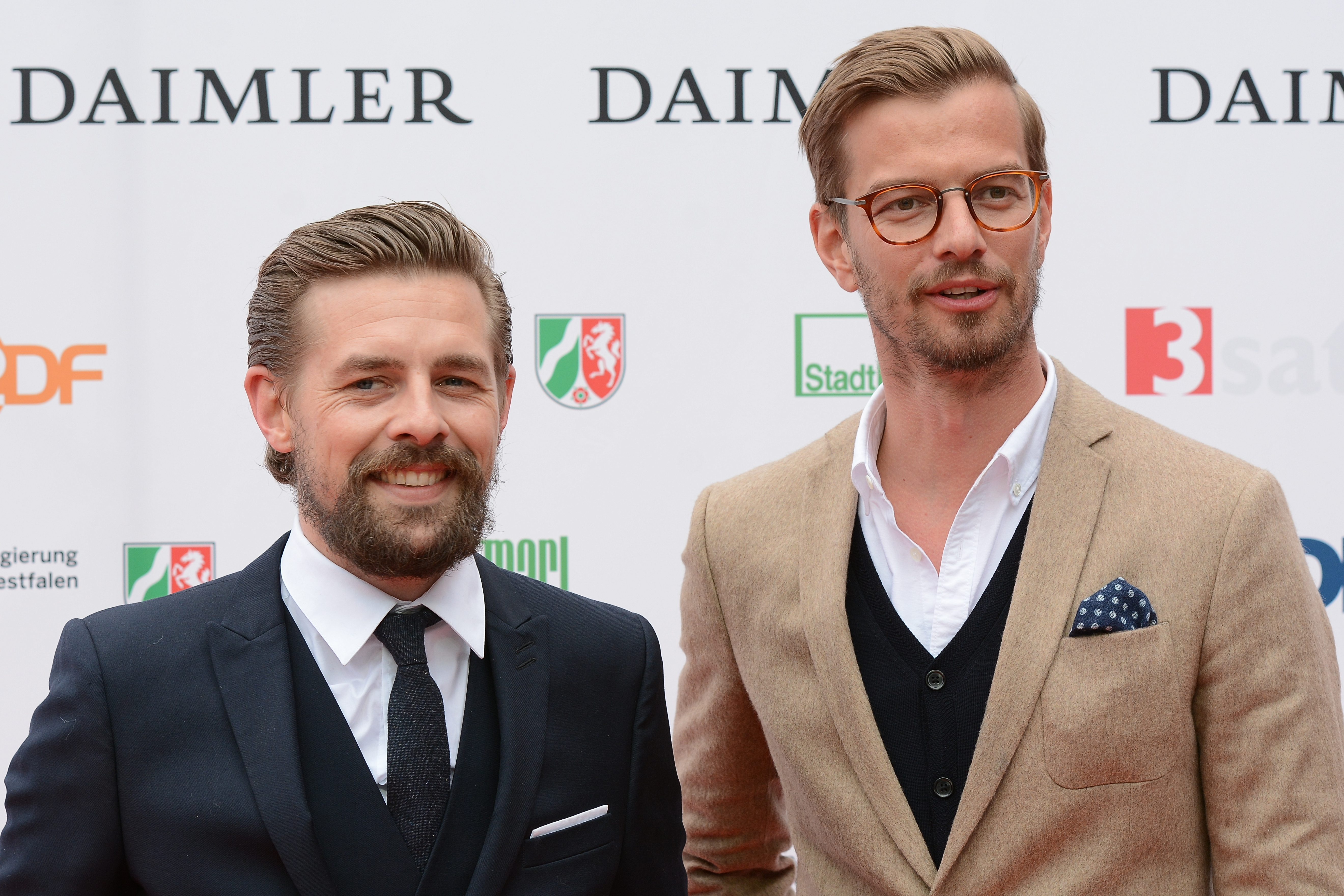 Verleihung des Grimme-Preises 2018.